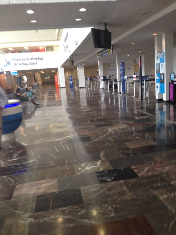 Pasillo principal del aeropuerto de Acapulco